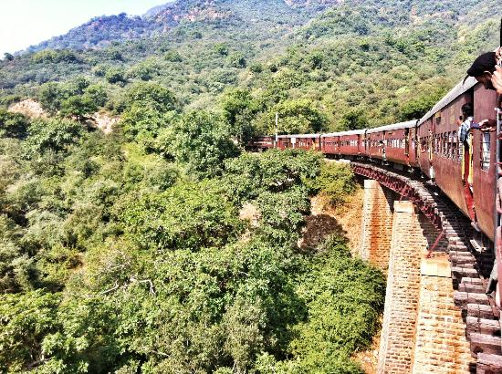 राजमंद क्षेत्र